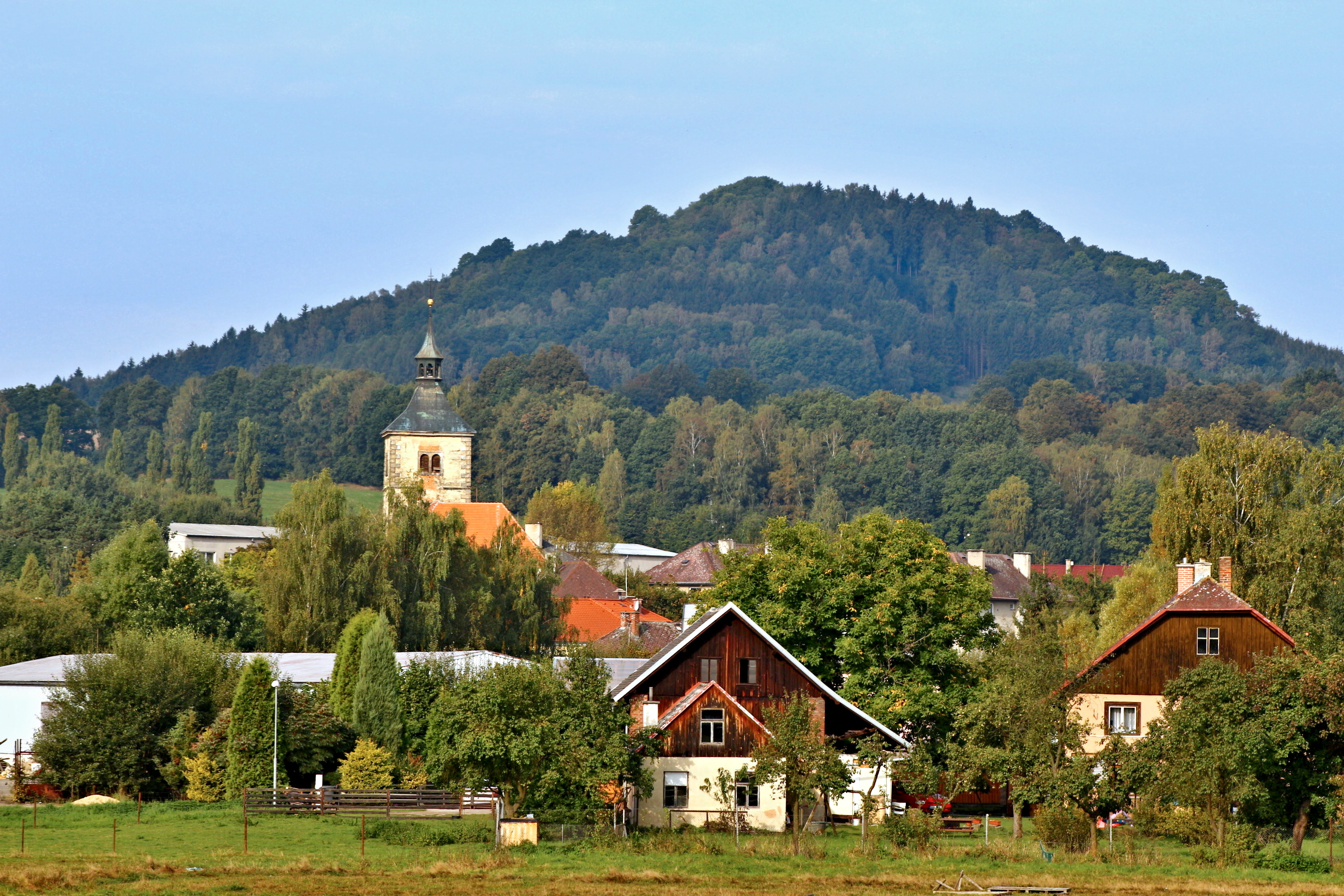 Brniště